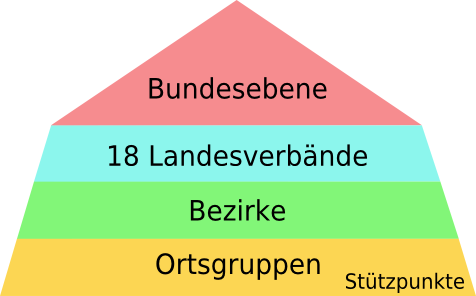 Gliederung der DLRG